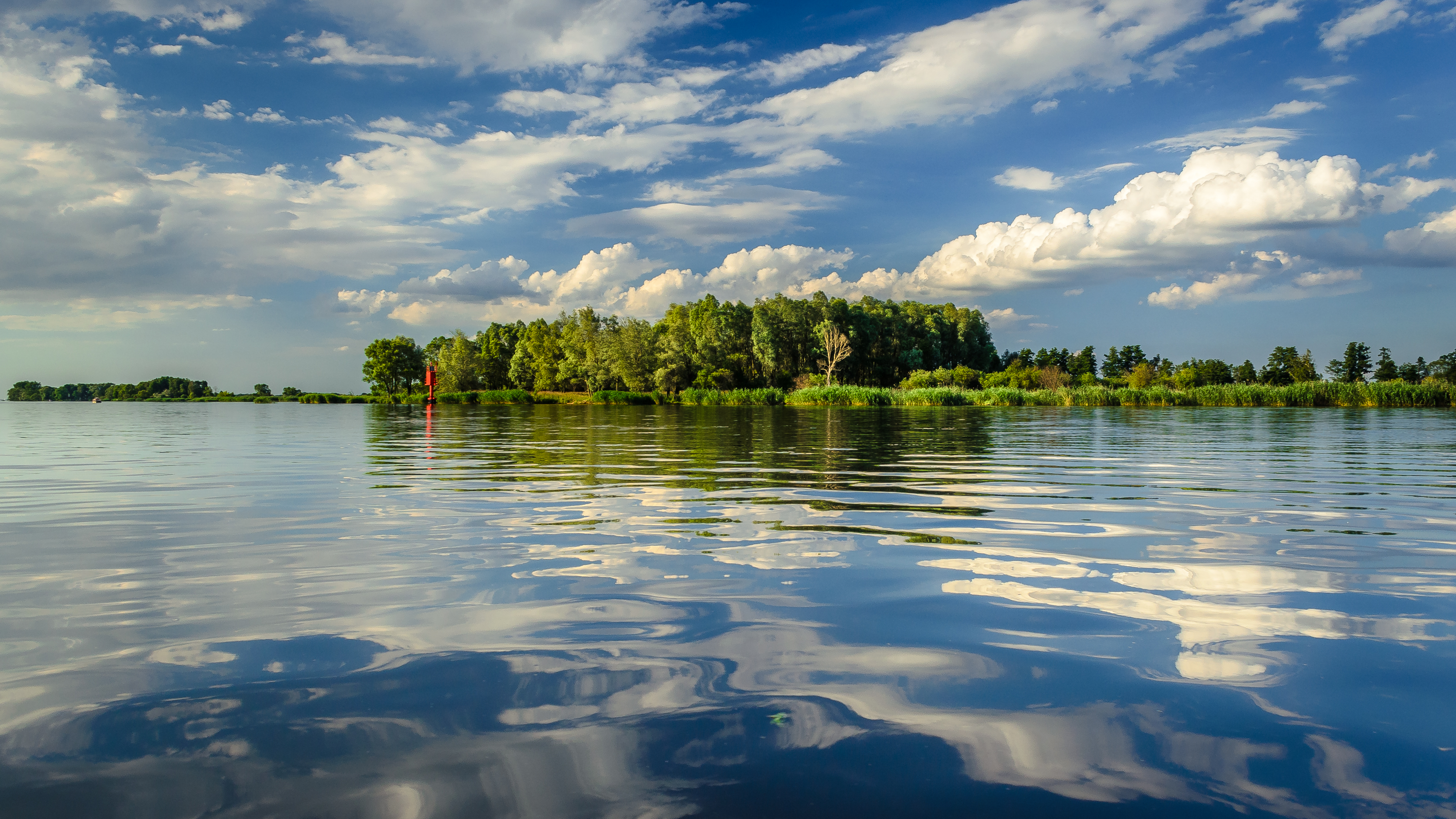 Specjalny obszar ochrony siedlisk Ujście Odry i Zalew Szczeciński. This is a photography of Natura 2000 protected area with ID PLH320018